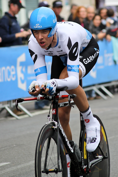 Ramunas Navardauskas lors de la 20e étape du Tour de France 2011.